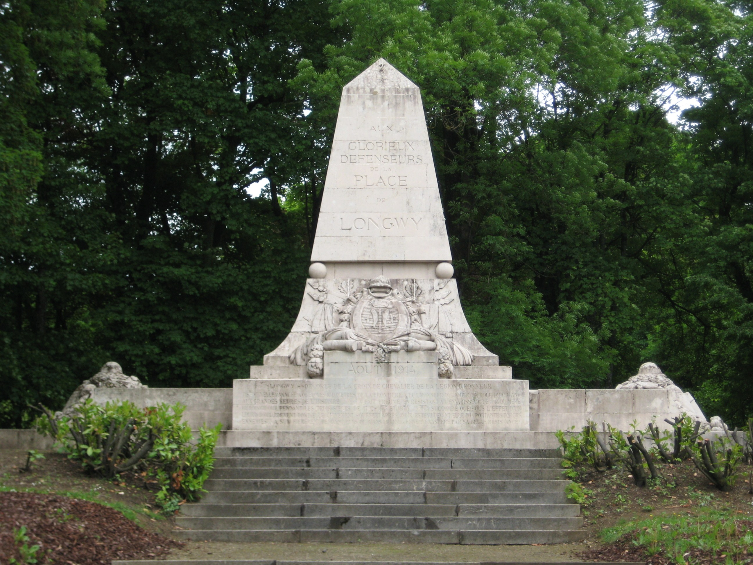 Description Monument commémoratif de Longwy 1914 Date16 May 2009Sourcemon appareil photoAuthorAimelaime Monument commémoratif de Longwy 1914